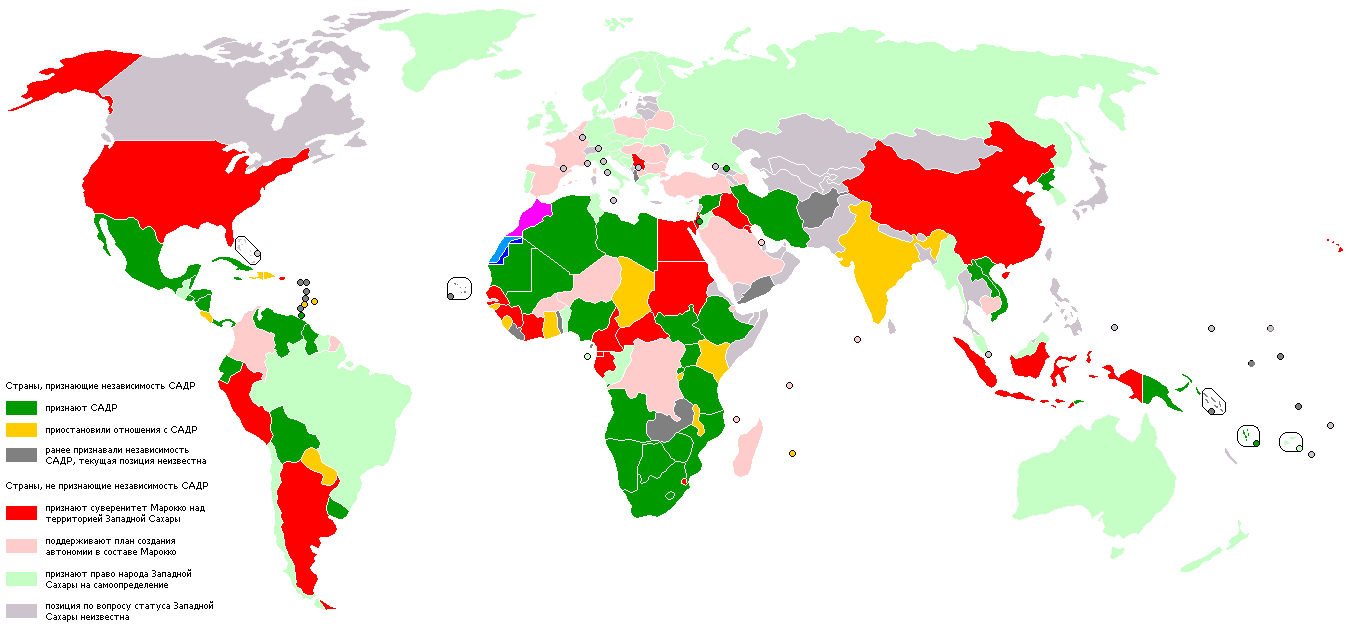 Карта мира с обозначением реакции стран на независимость САДР Марокко Часть Западной Сахары, оккупированная Марокко Часть Западной Сахары, контролируемая Сахарской АДР ("Свободная зона") Признают независимость Сахарской Арабской Демократической Республики Признают независимость Сахарской АДР (дипломатические отношения приостановлены) Признают суверенитет Марокко над Западной Сахарой Признают статус недеколонизированной территории (согласно резолюциям ООН): Поддерживают автономию Западной Сахары в составе Марокко Поддерживают идею независимости Сахарской Арабской Демократической Республики Придерживаются нейтральной позиции Придерживаются нейтральной позиции (ранее признавали Сахарскую АДР)